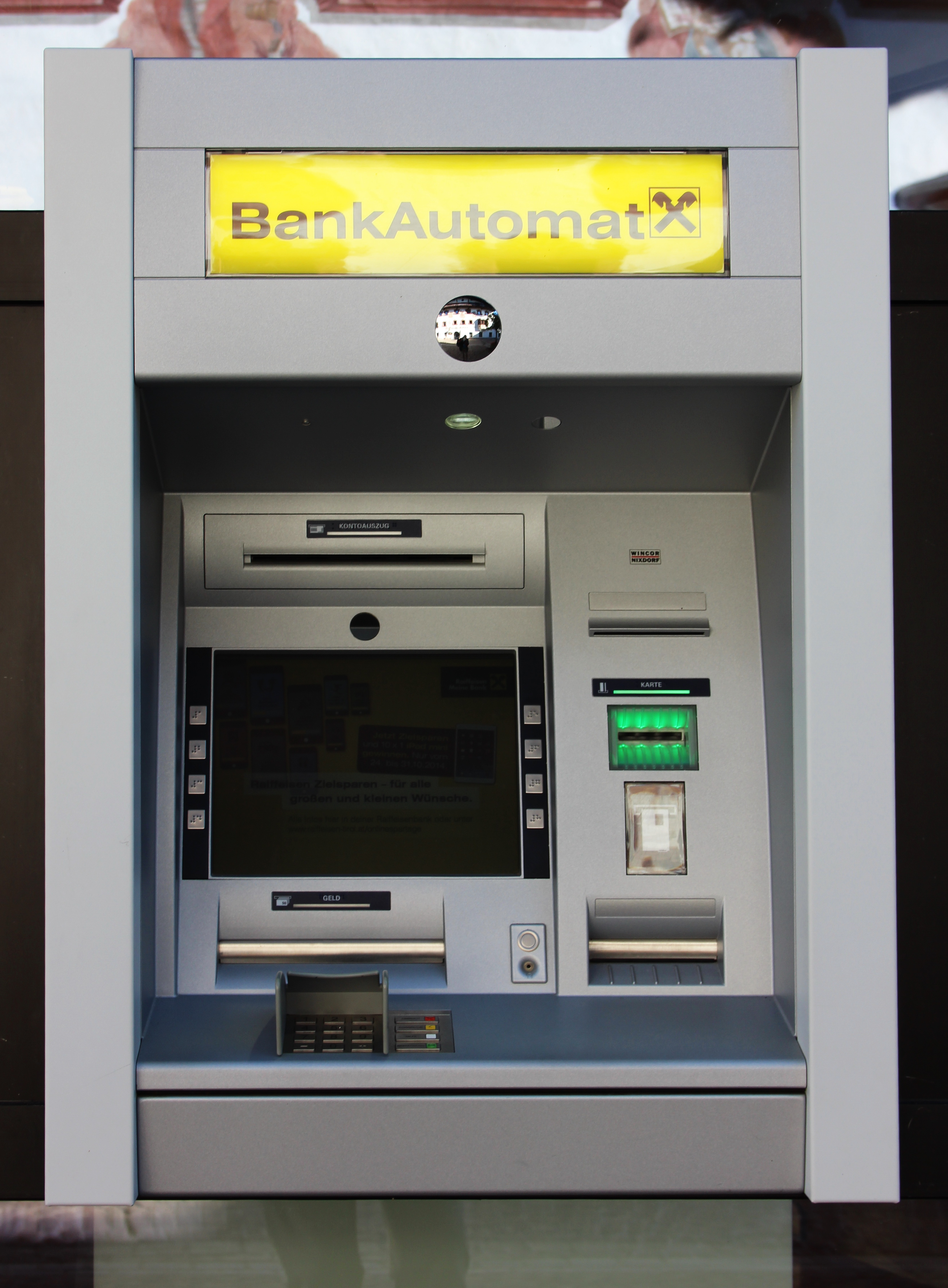 Bankautomat in Kufstein der Raiffeisenbank